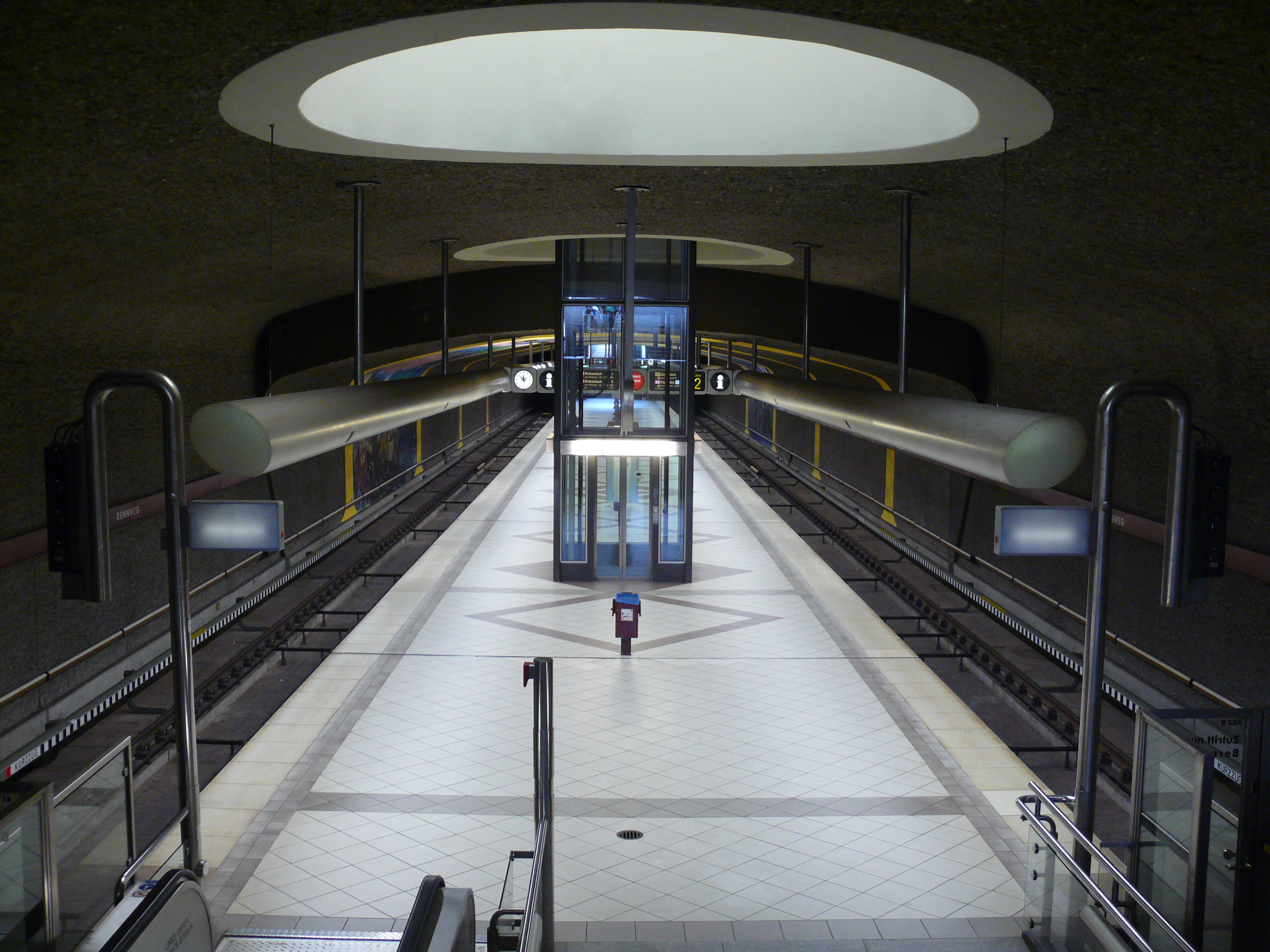 Blick auf die Bahnsteigebene am U-Bahnhof Rennweg in Nürnberg.